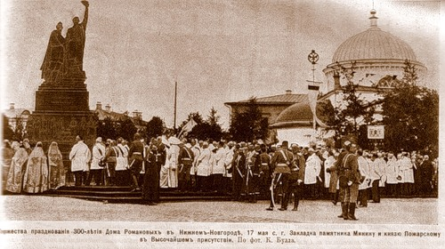 Проведение торжеств 300-летия дома Романовых в Нижнем Новгороде. Журнал «Нива», № 24 за 1913 год.